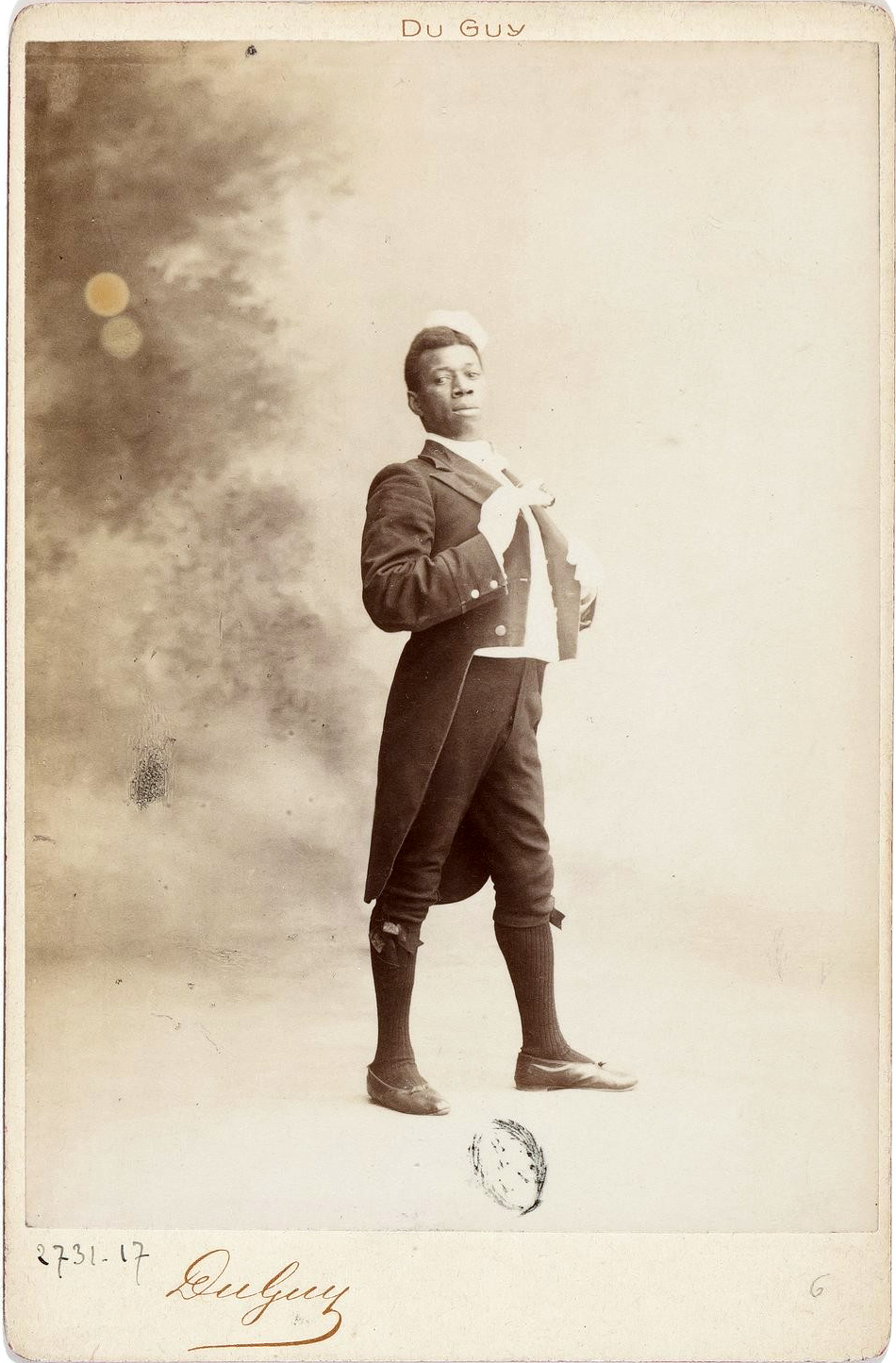 Portrait de Chocolat